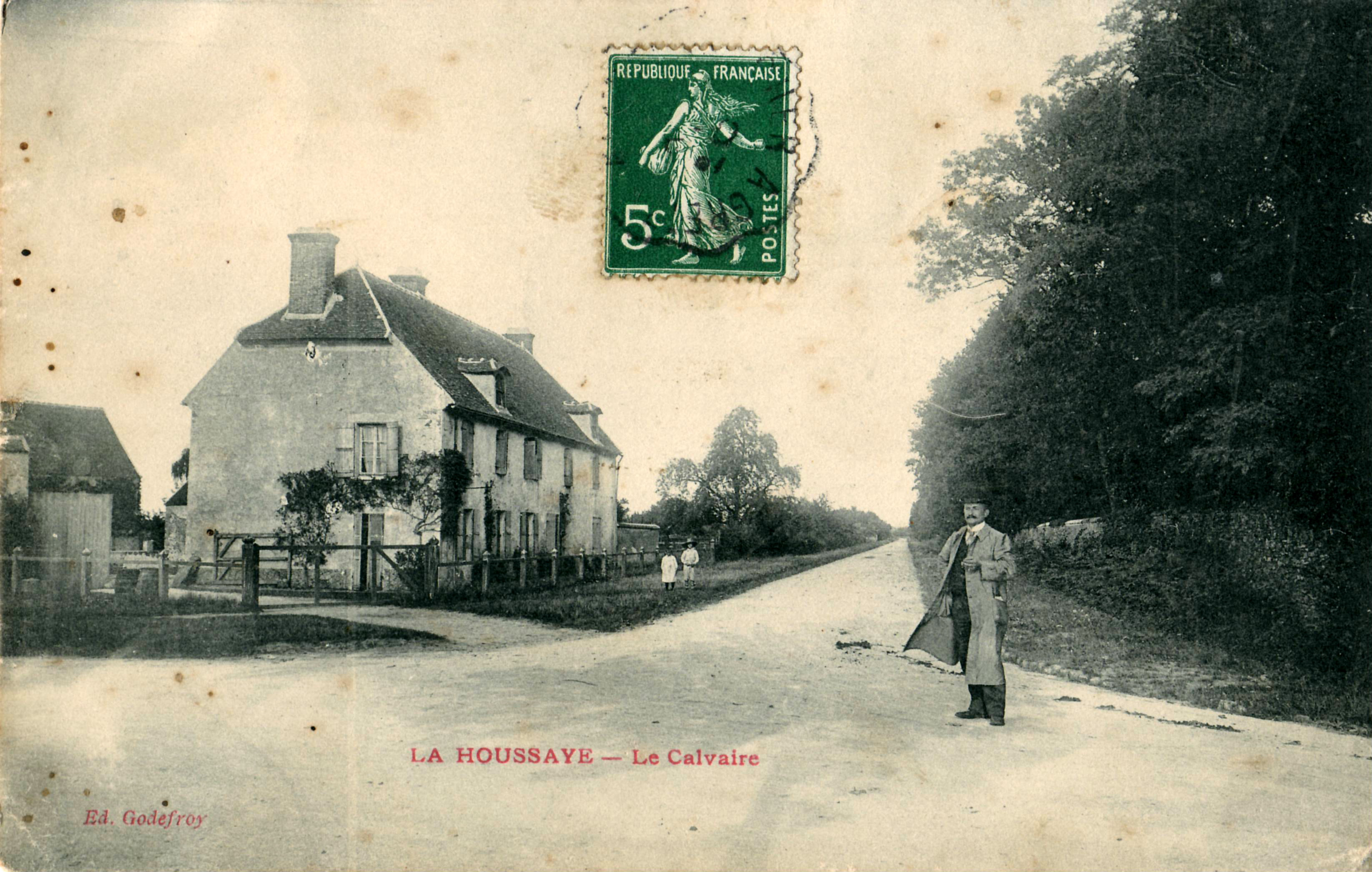 Carte postale ancienne éditée par Godefroy : LA HOUSSOYE - Le Calvaire